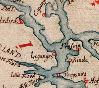 Sjøkart fra 1610 over kysten fra Karmøy til Geirangerfjorden. Håndtegnet i ukjent målestokk. Original kartstørrelse ca 74 cm x 31 cm. Et eksemplar befinner seg hos Statens kartverk Sjø i Stavanger.